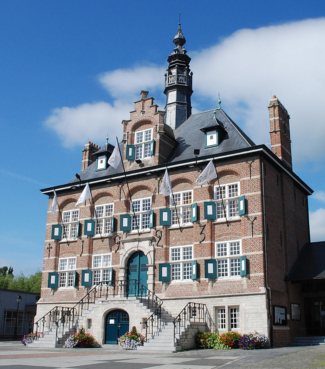 Het gemeentehuis van Zomergem, België. Ontwerp van archit. Valentin Vaerwyck.